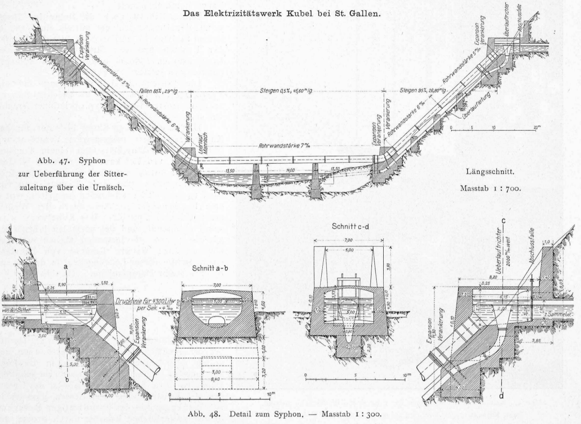 Pläne des Siphons, mit dem die Sitter bei Stein AR die Urnäsch überquert.